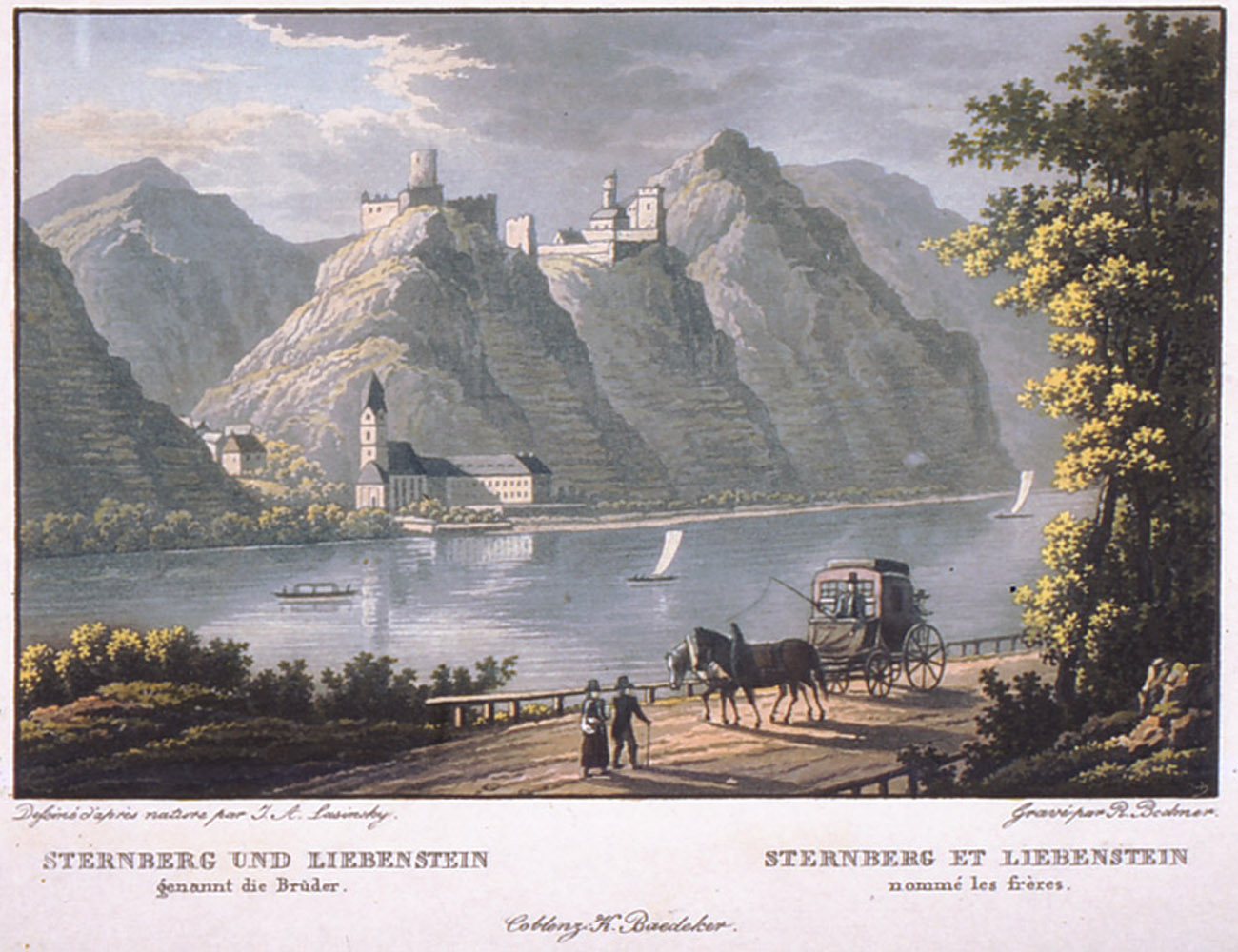 Altkolorierter Aquatintastich von Rudolf Bodmer nach Vorlage von J.A. Lasinsky